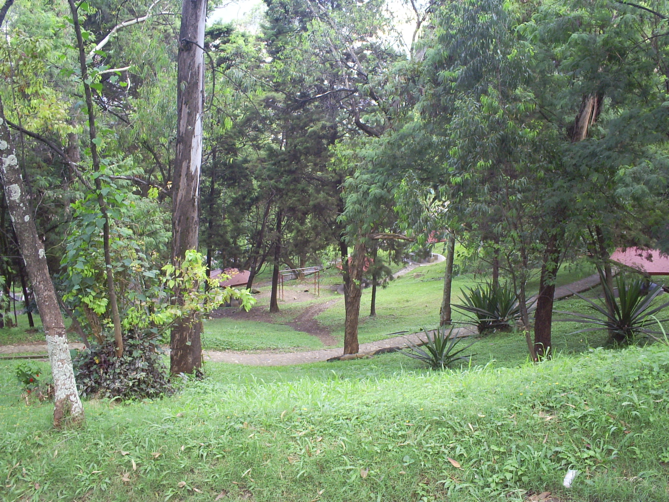 Cerro Nutibara, Medellín, Colombia.